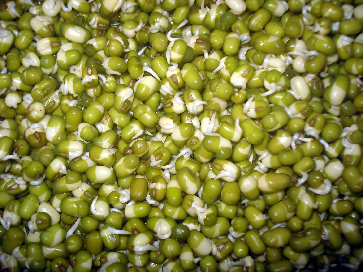 മുളപ്പിച്ച ചെറുപയര്‍